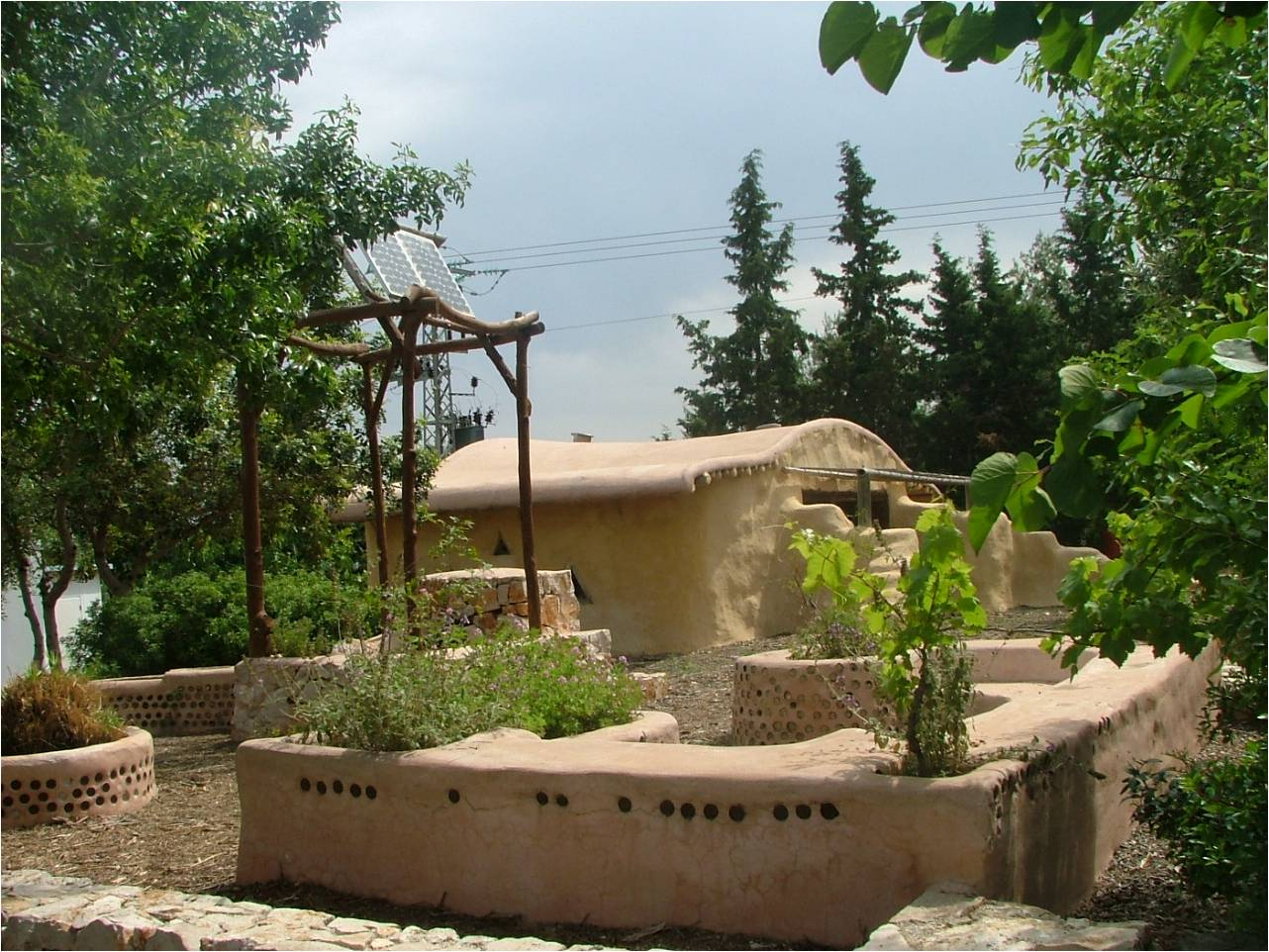 כיתת לימוד אקולוגית עם בוסתן , מועצה אזורית משגב